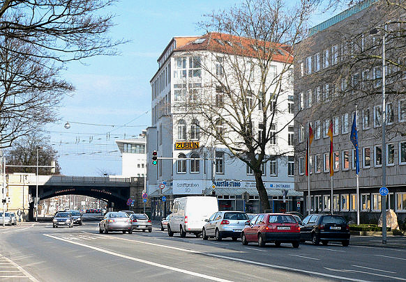 Straße Schiffgraben in Hannover, rechts Landwirtschaftskammer, linke Bahnüberführung